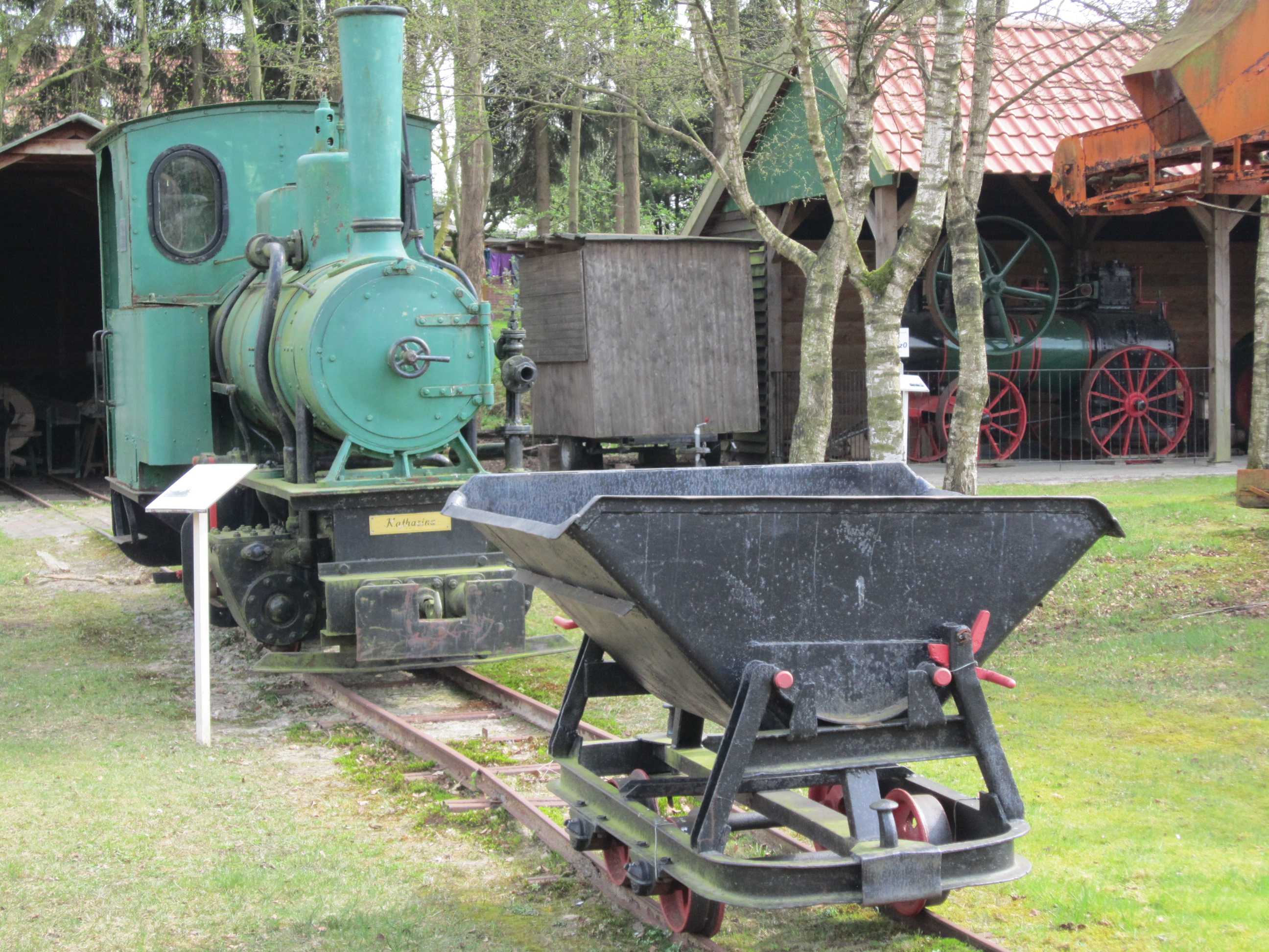 Moor- und Fehnmuseum Elisabethfehn. Station der Europäischen Route der Industriekultur im Nordwesten